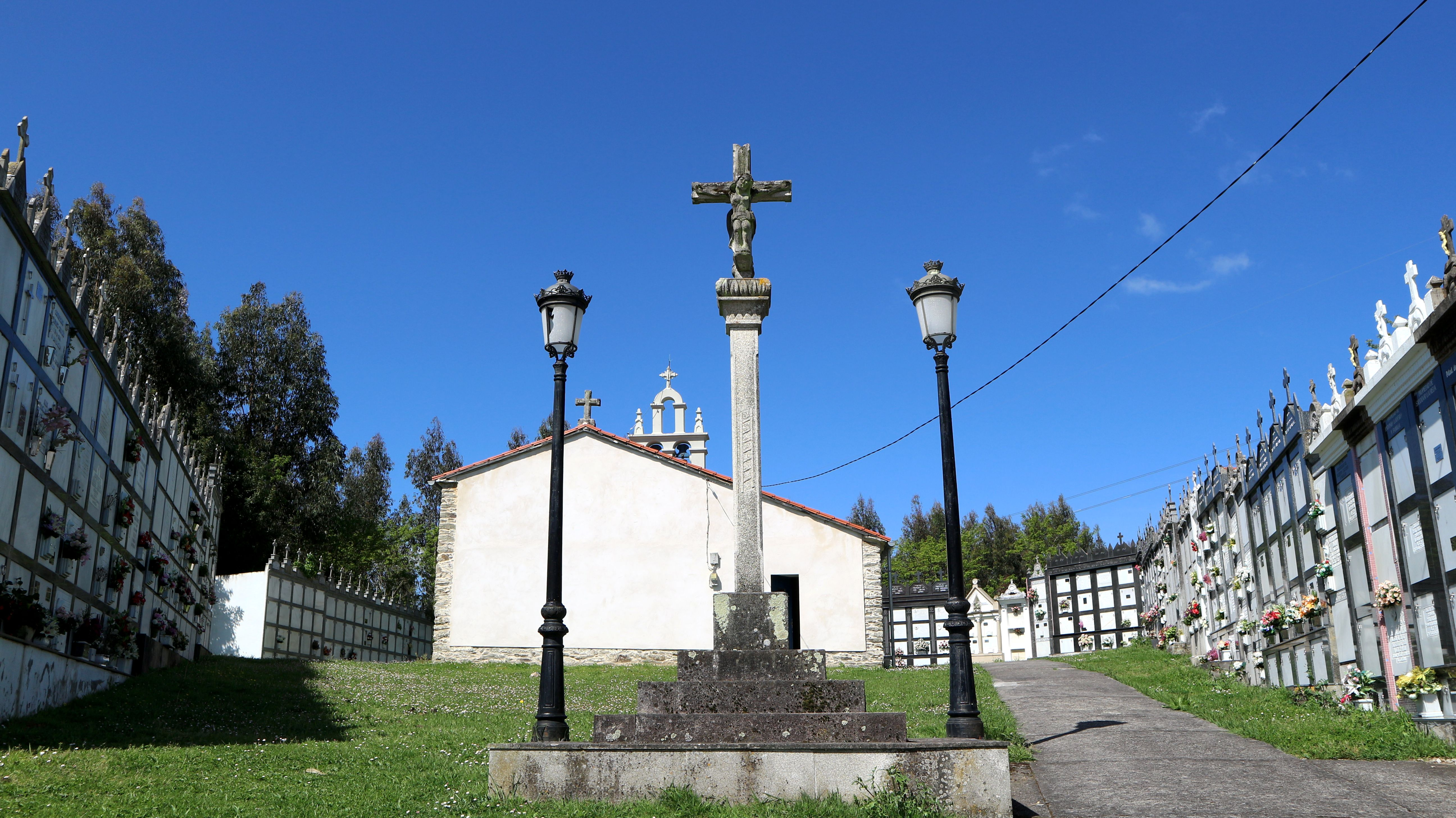 Igrexa e cruceiro de Santiago de Meangos. En Meangos, Abegondo.